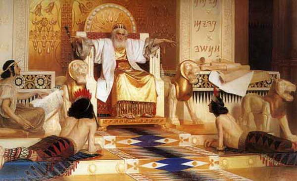 Аскназий Исаак. Суета Сует и всяческая суета. Vanitas vanitatum et omnia vanitas